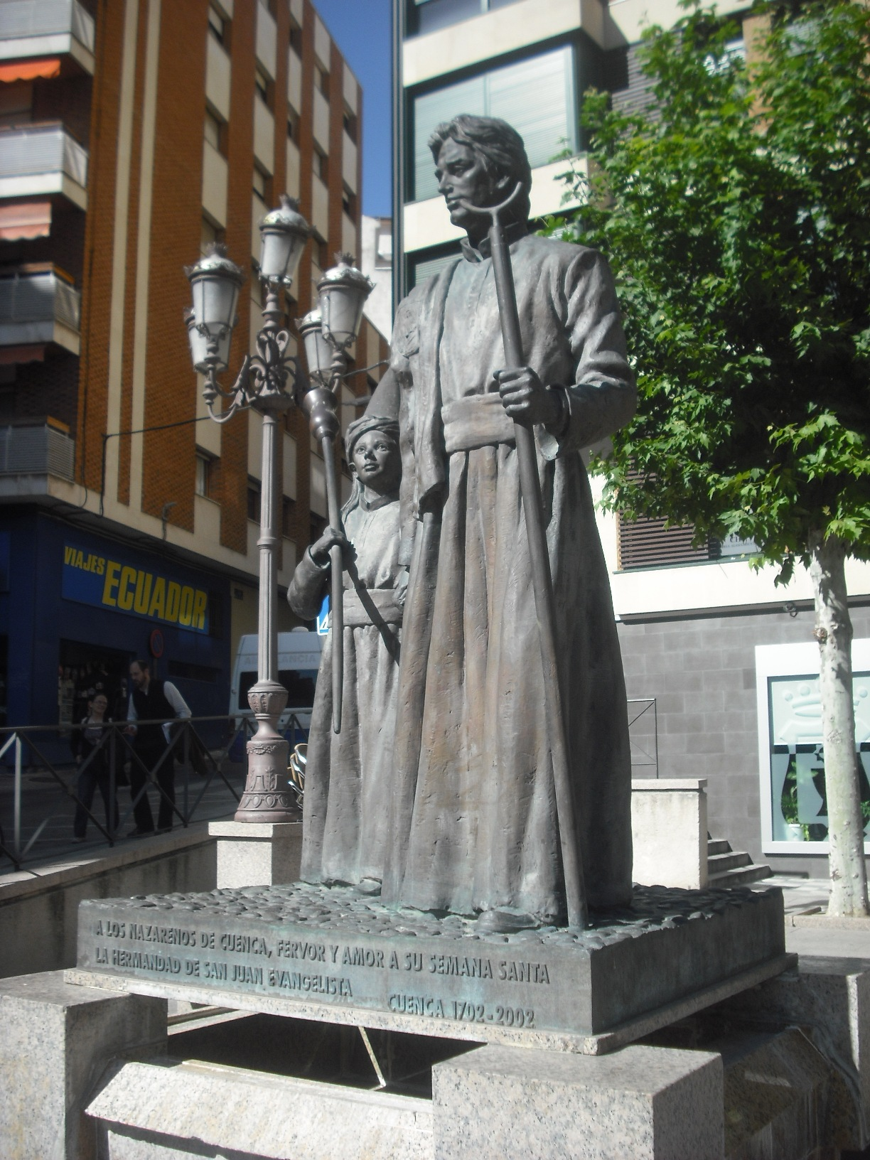 Estatua de Semana Santa.